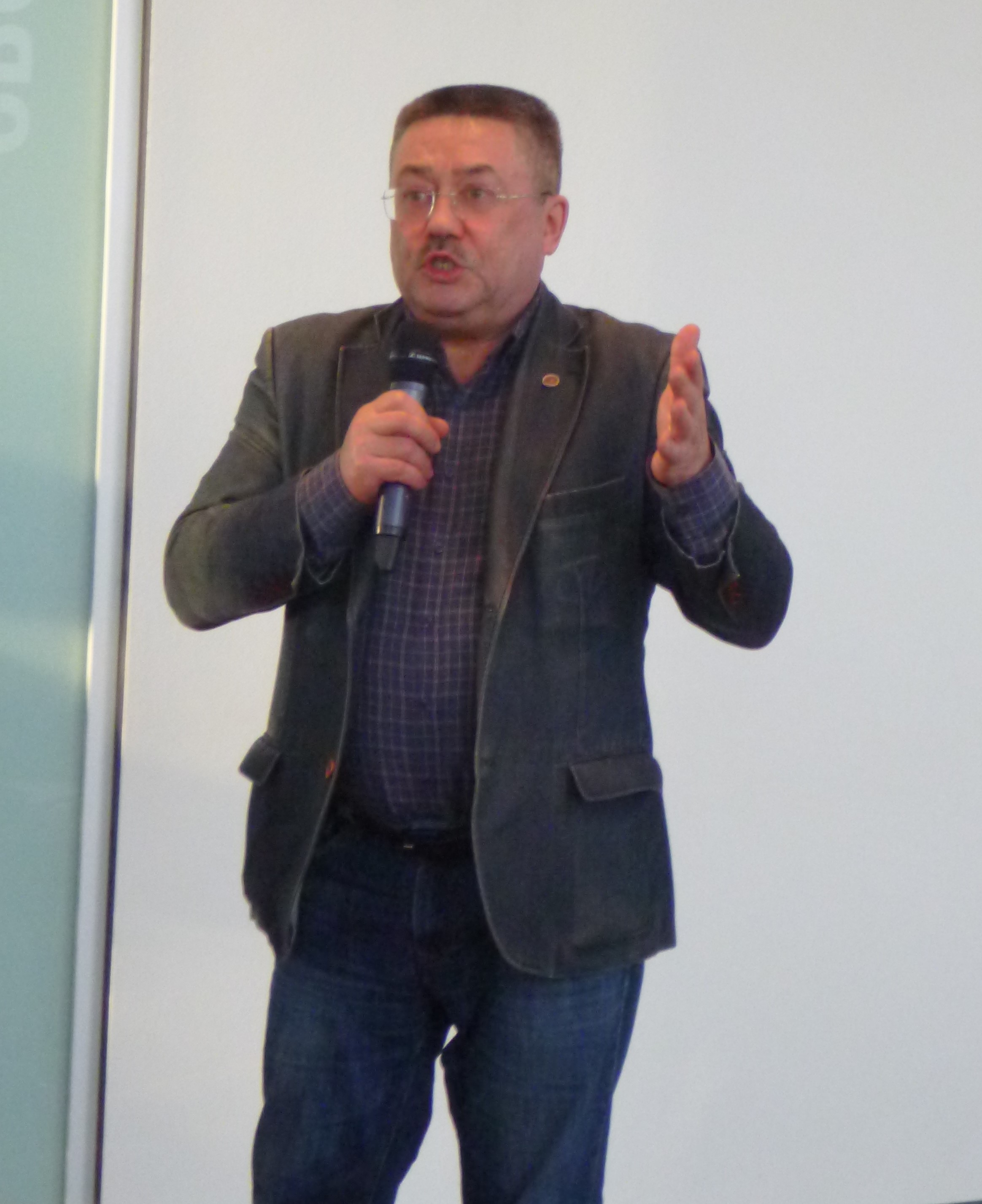 Уполномоченный по правам ребенка в Свердловской области Игорь Рудольфович Мороков в Ельцин-центре 29 февраля 2020 года